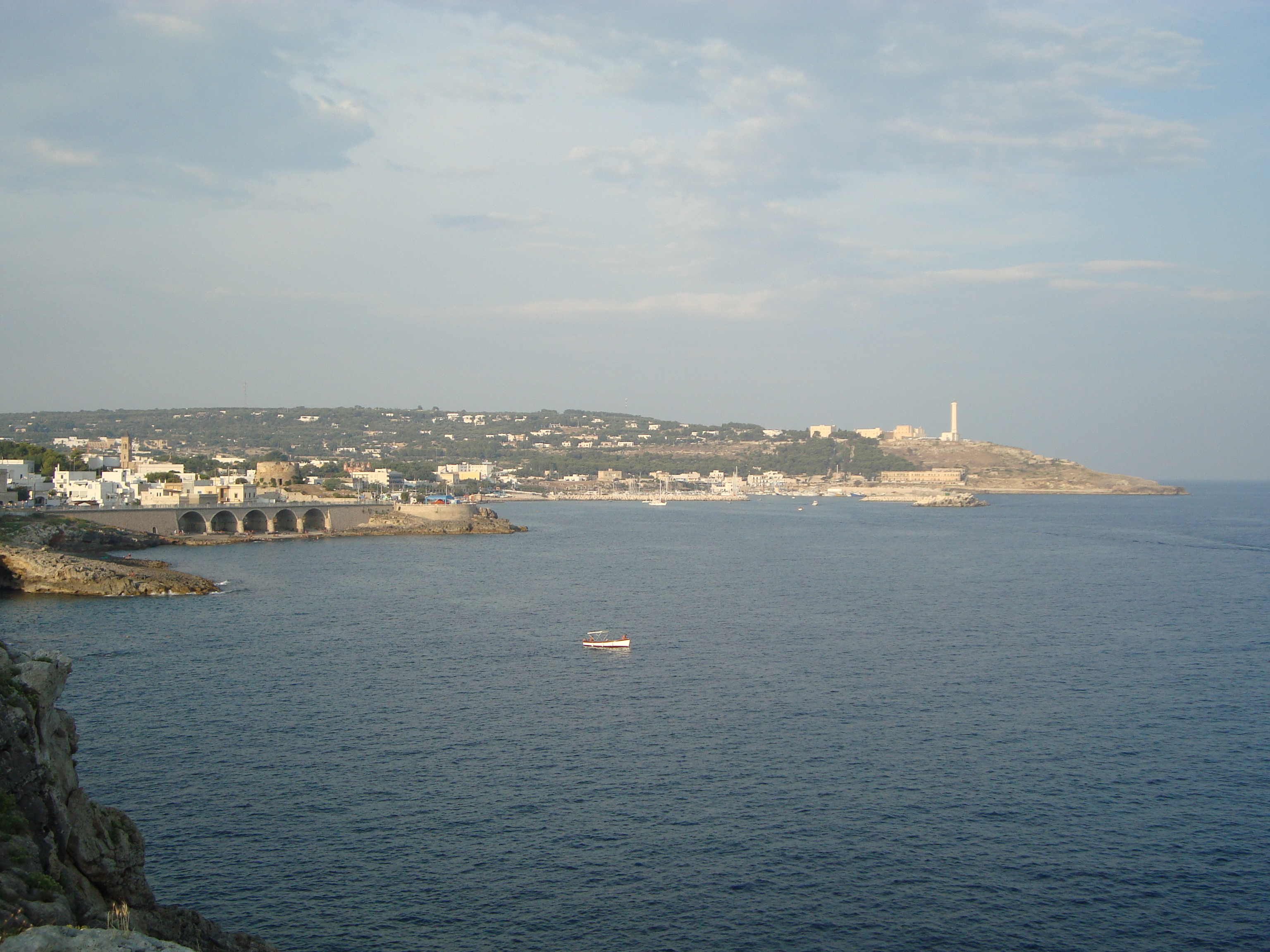 Santa Maria di Leuca, frazione de la commune de Castrignano del Capo